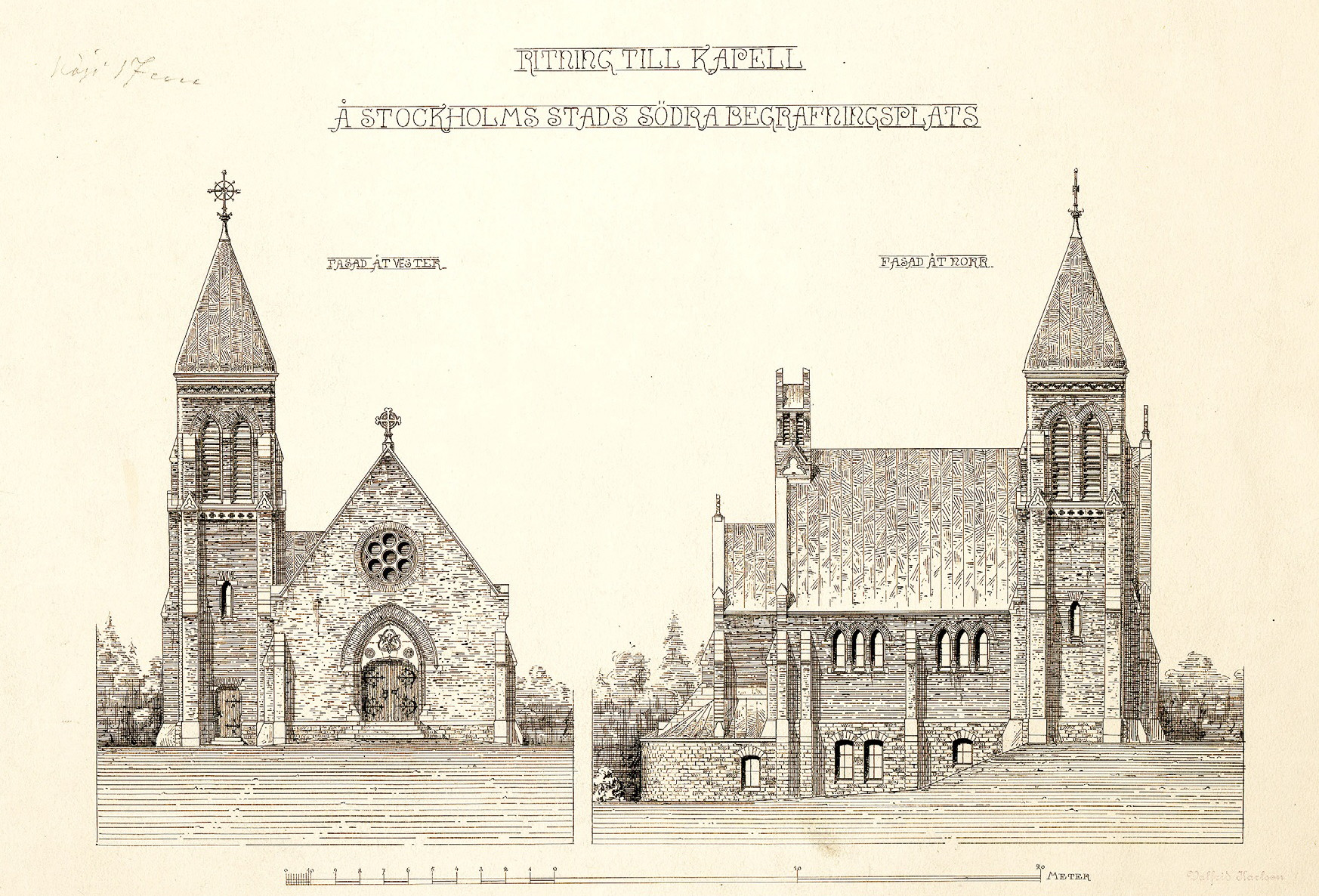 Ritning till Sandsborgs kapell, arkitekt Valfrid Karlson